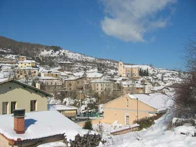 Villanueva de Cameros en invierno